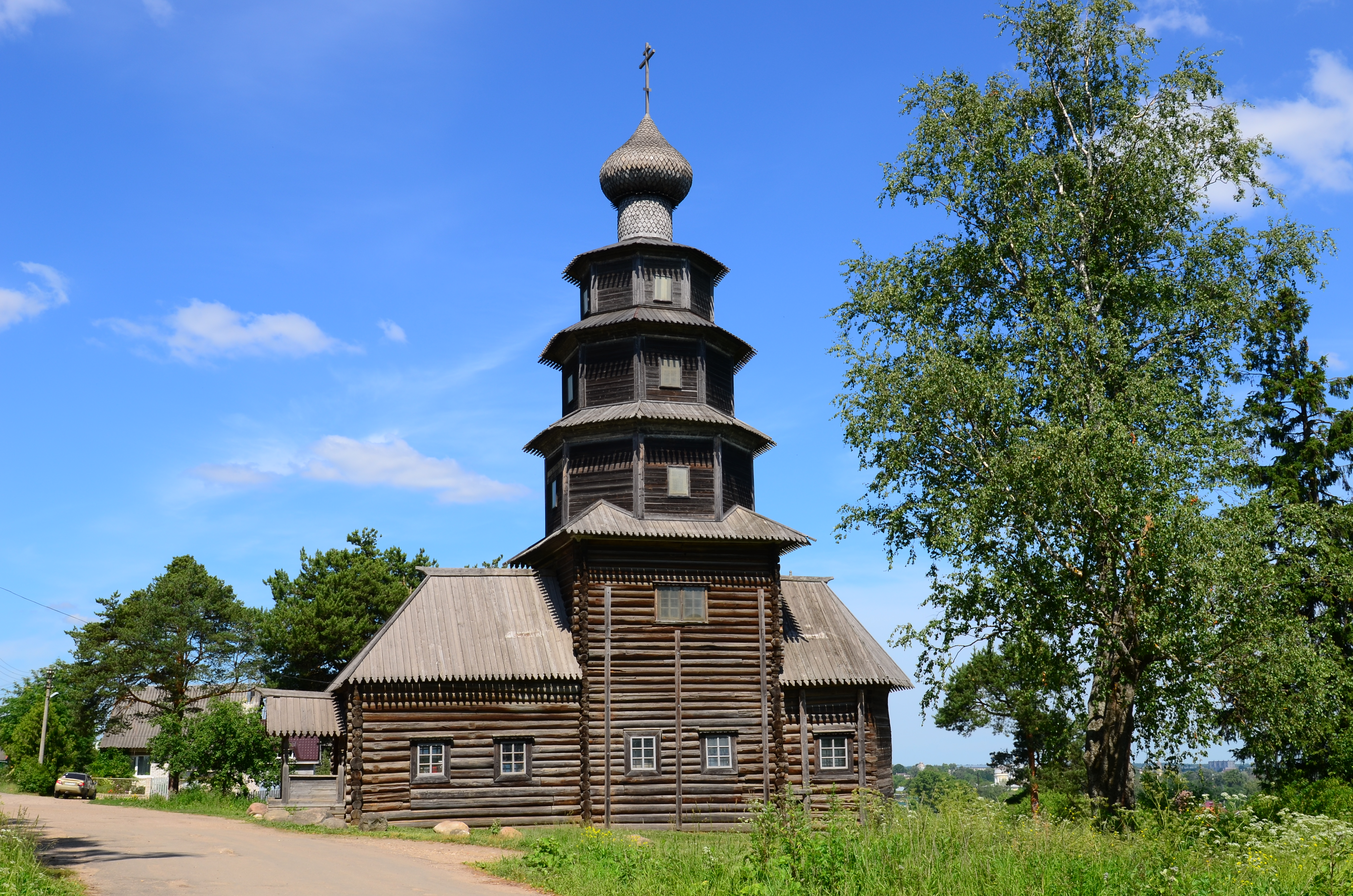 Церковь Вознесения (деревянная) с росписью: улица Грузинская, 29, Торжок, Тверская область